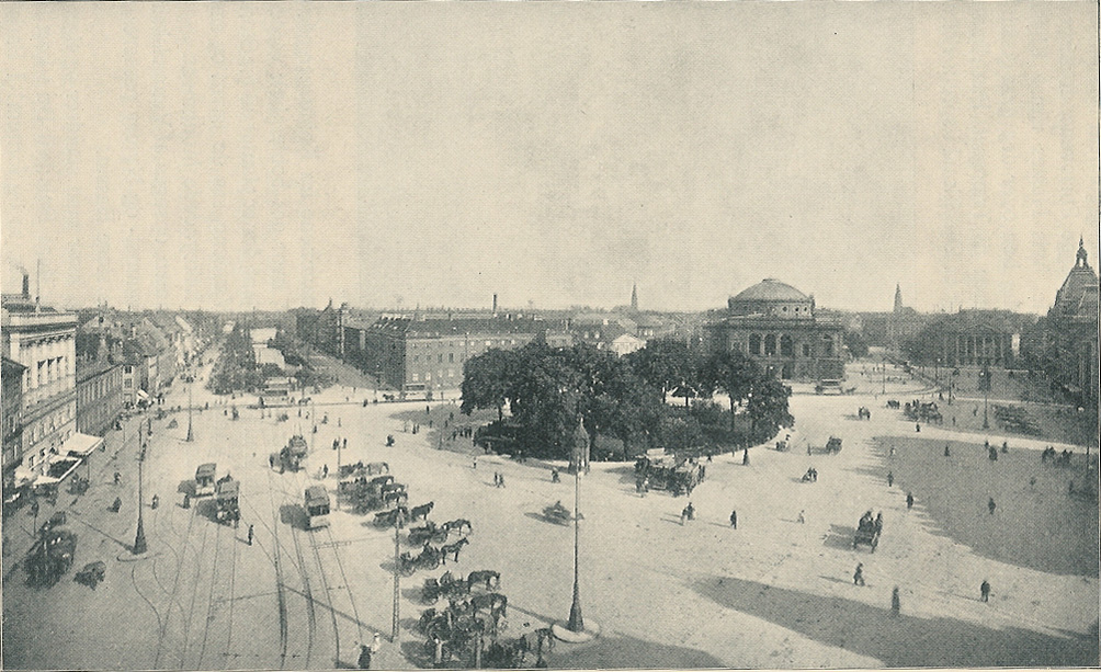 Udsigt over Kongens Nytorv i København omkring år 1900